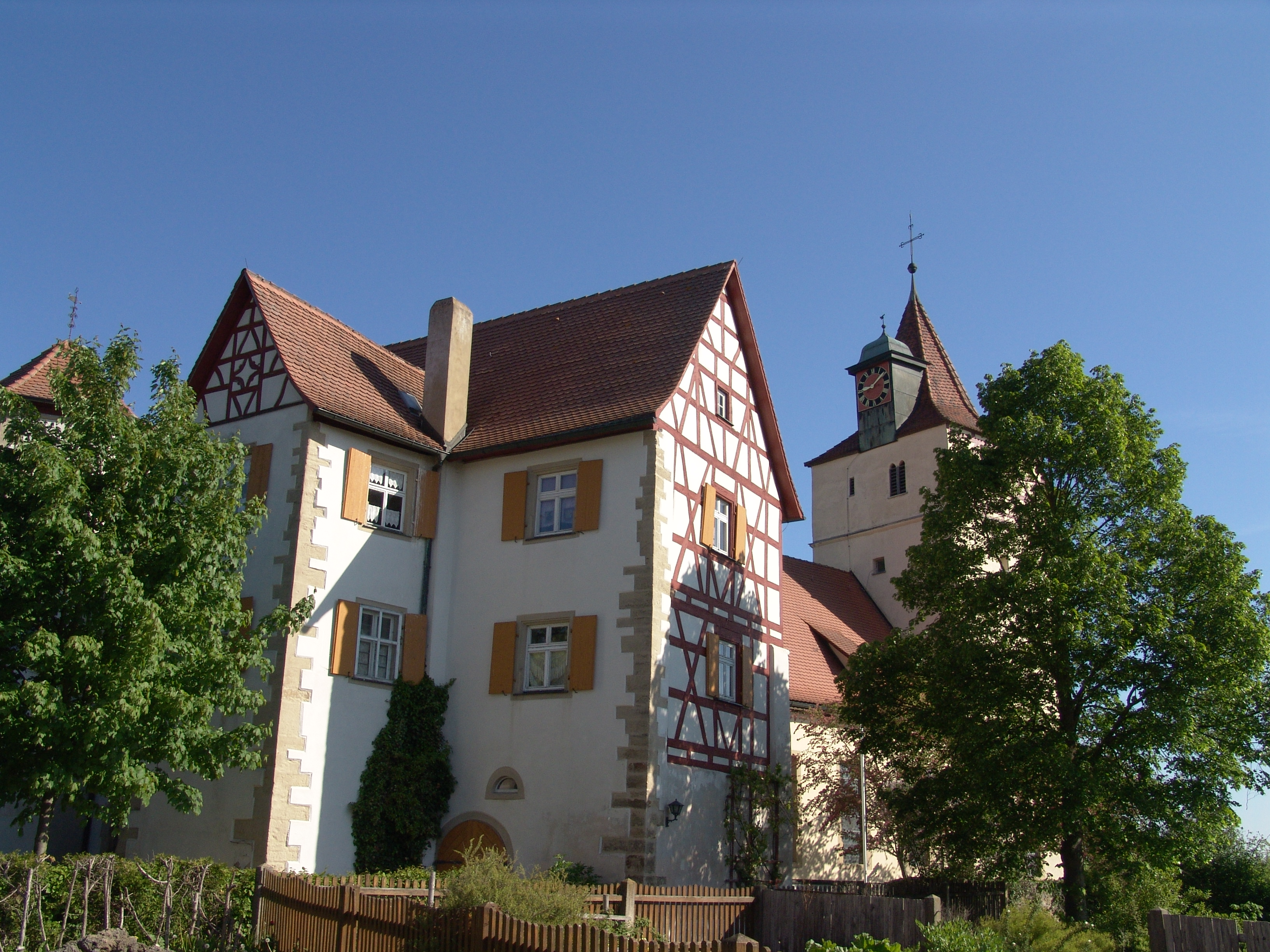 Schloss Habelsee